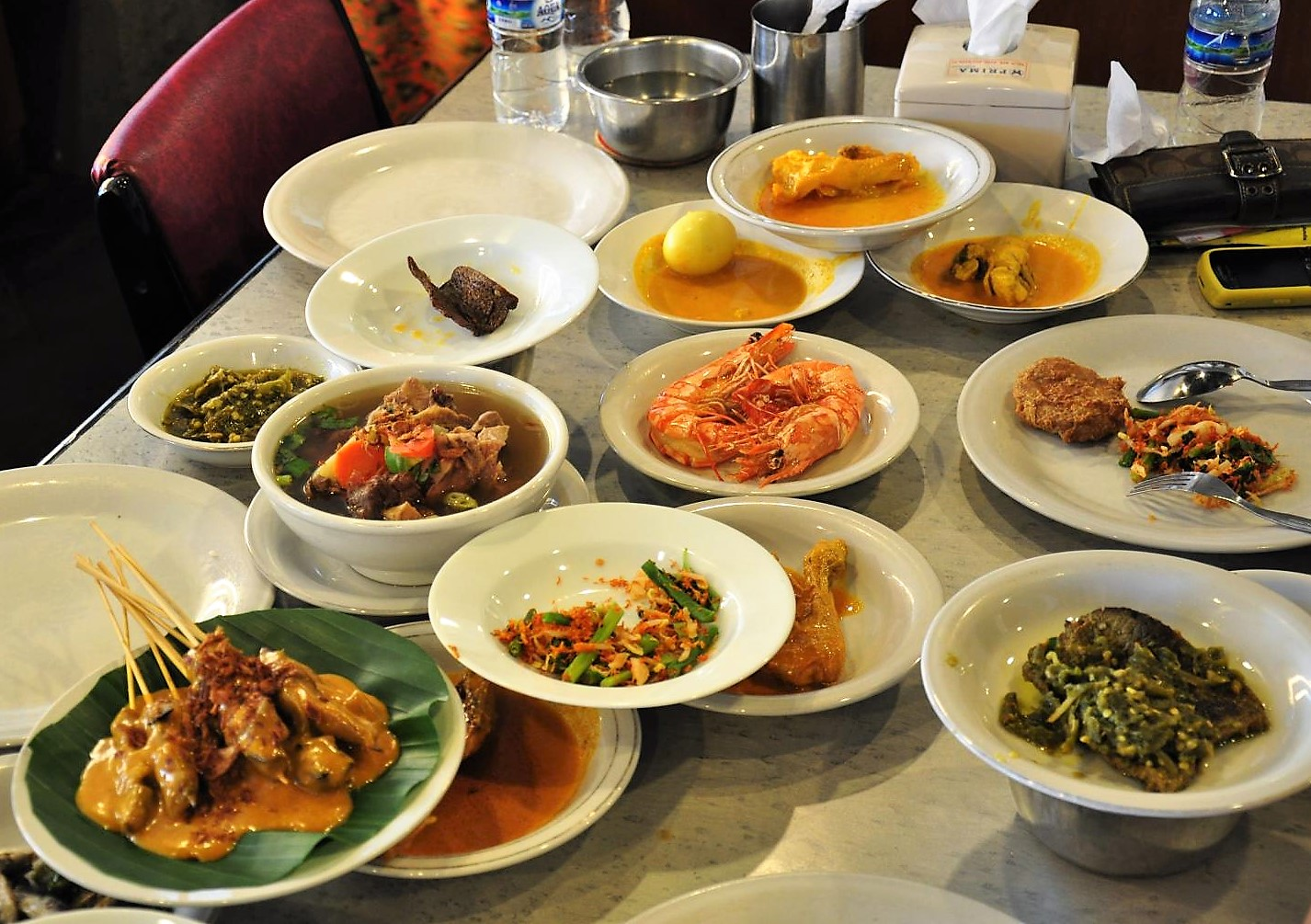 Nasi Padang, in einem Restaurant in Jakarta, Indonesien.